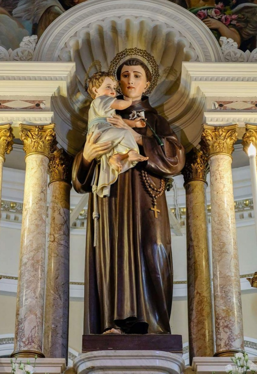 foto sant'antonio